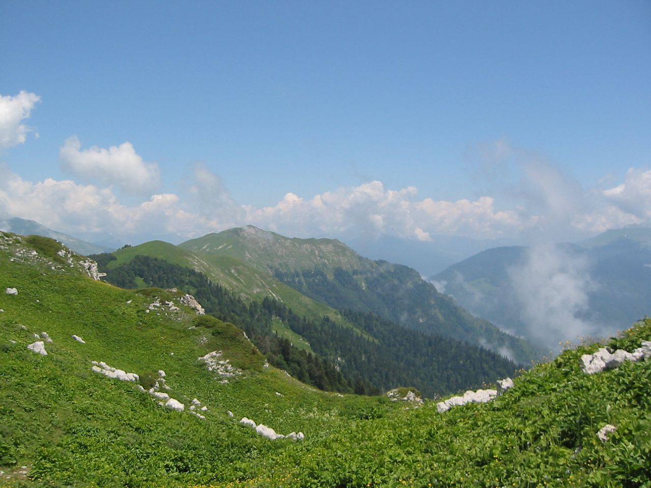 Gagra mountains